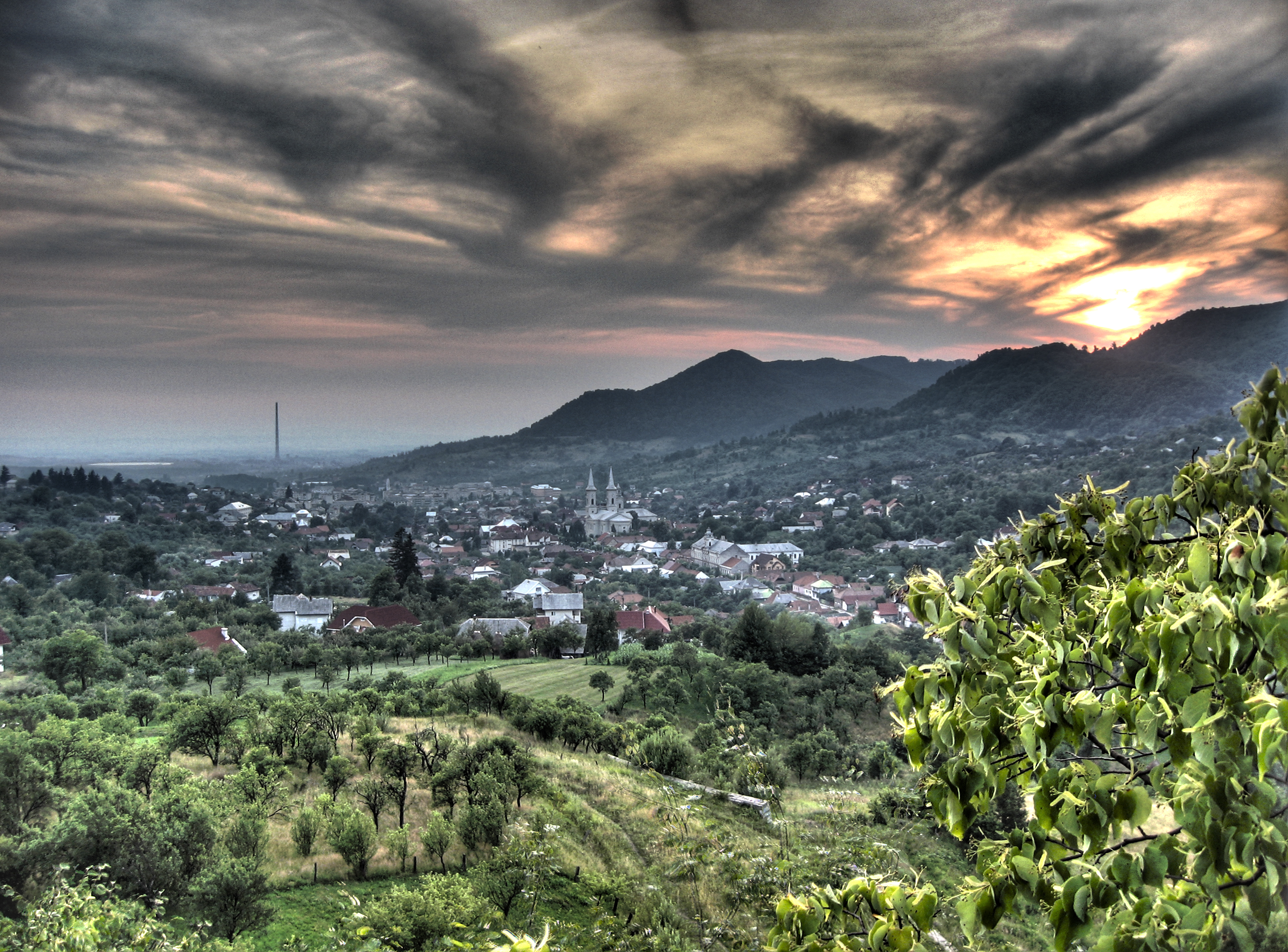 Baia Sprie (Felsőbánya), Maramureş County, Romania